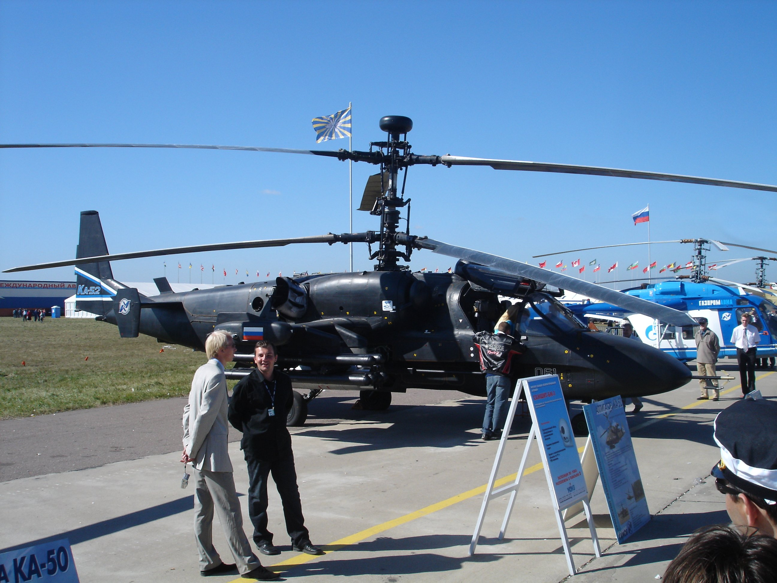 Kamov Ka-52